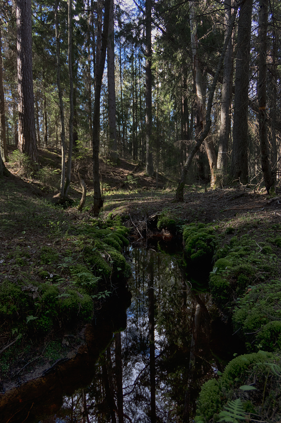 Urskog. Bäcken har grävt sig ned i sedimenten. Den bildar reservatets östra gräns.